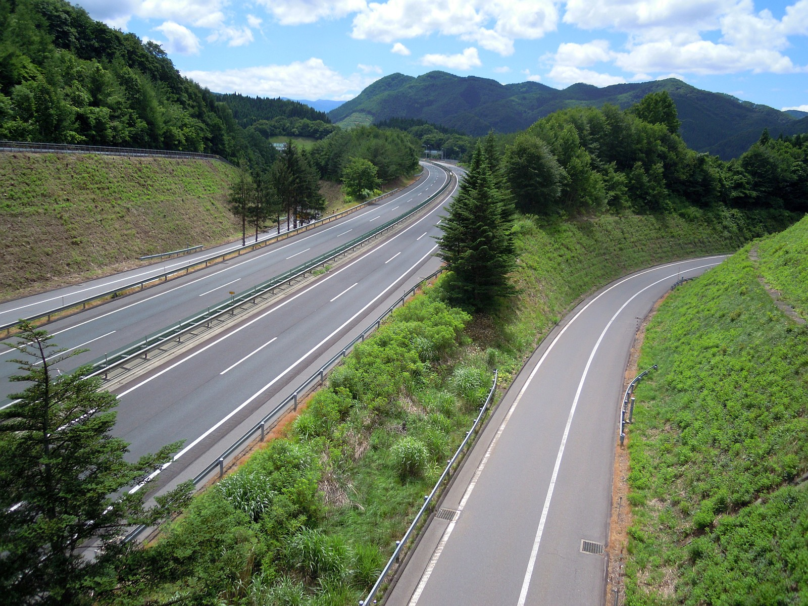 岩手県八幡平市にある安代ジャンクションを八戸方面から盛岡方面に向けて。中央の片側2車線のランプウェイが八戸方面と盛岡方面を結ぶランプウェイ。右側の1車線のランプウェイは青森方面から八戸方面へ、左側の1車線のランプウェイが八戸方面から青森方面へのランプウェイ。